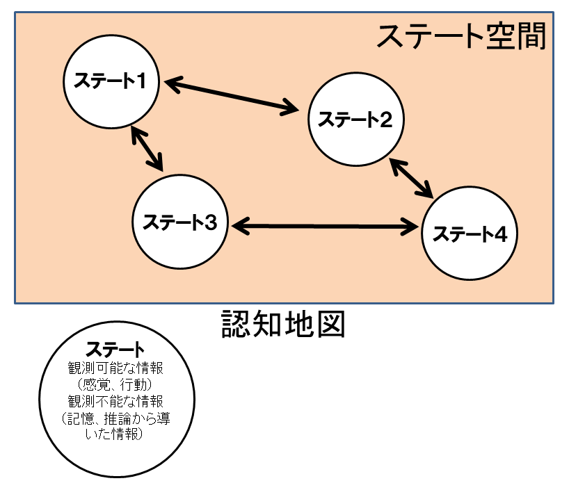 ステート空間理論についての説明